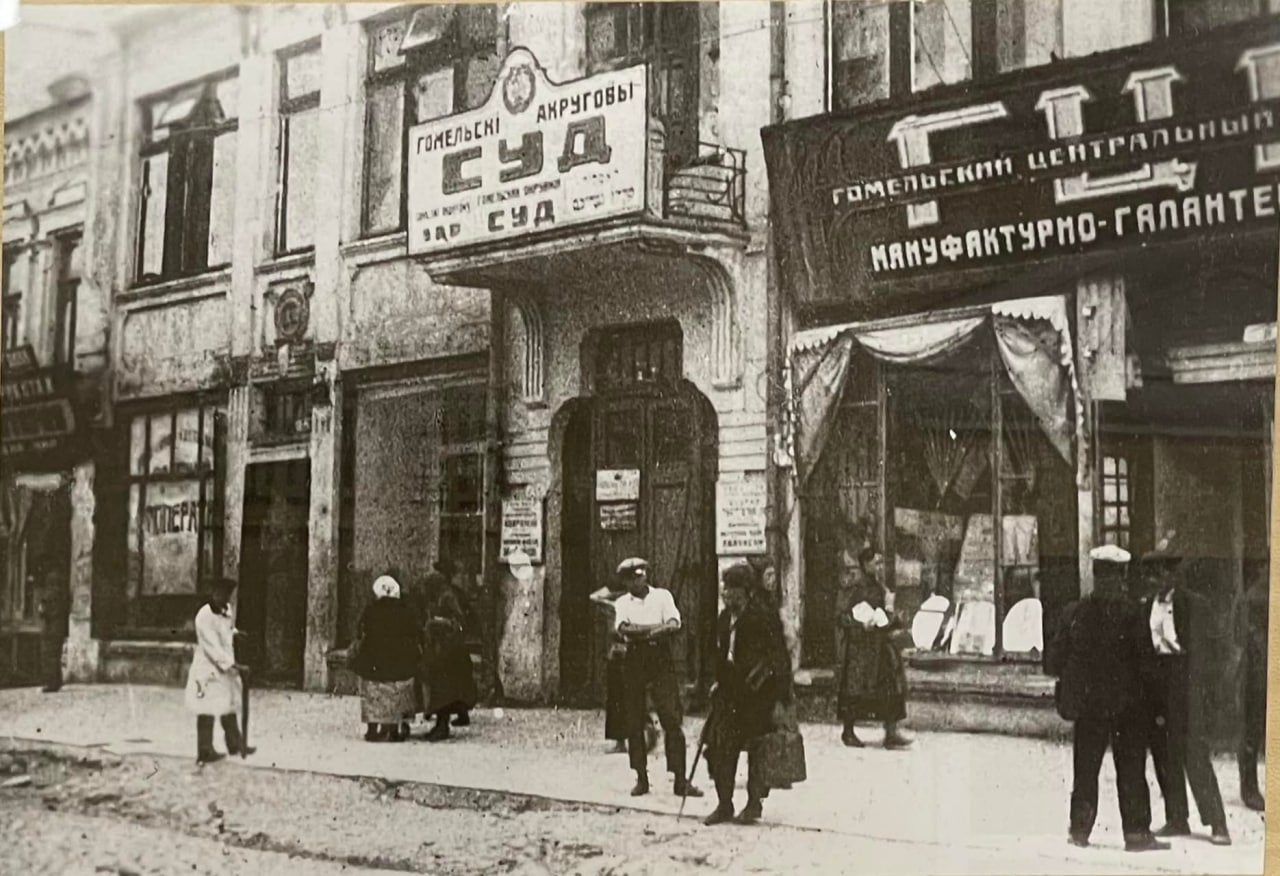 Беларуская (тарашкевіца): Гомель (Homiel), вуліца Прабойная (vulica Prabojnaja)